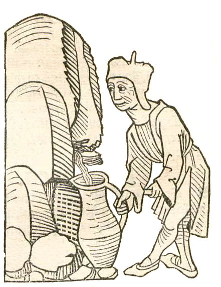 Petroleum